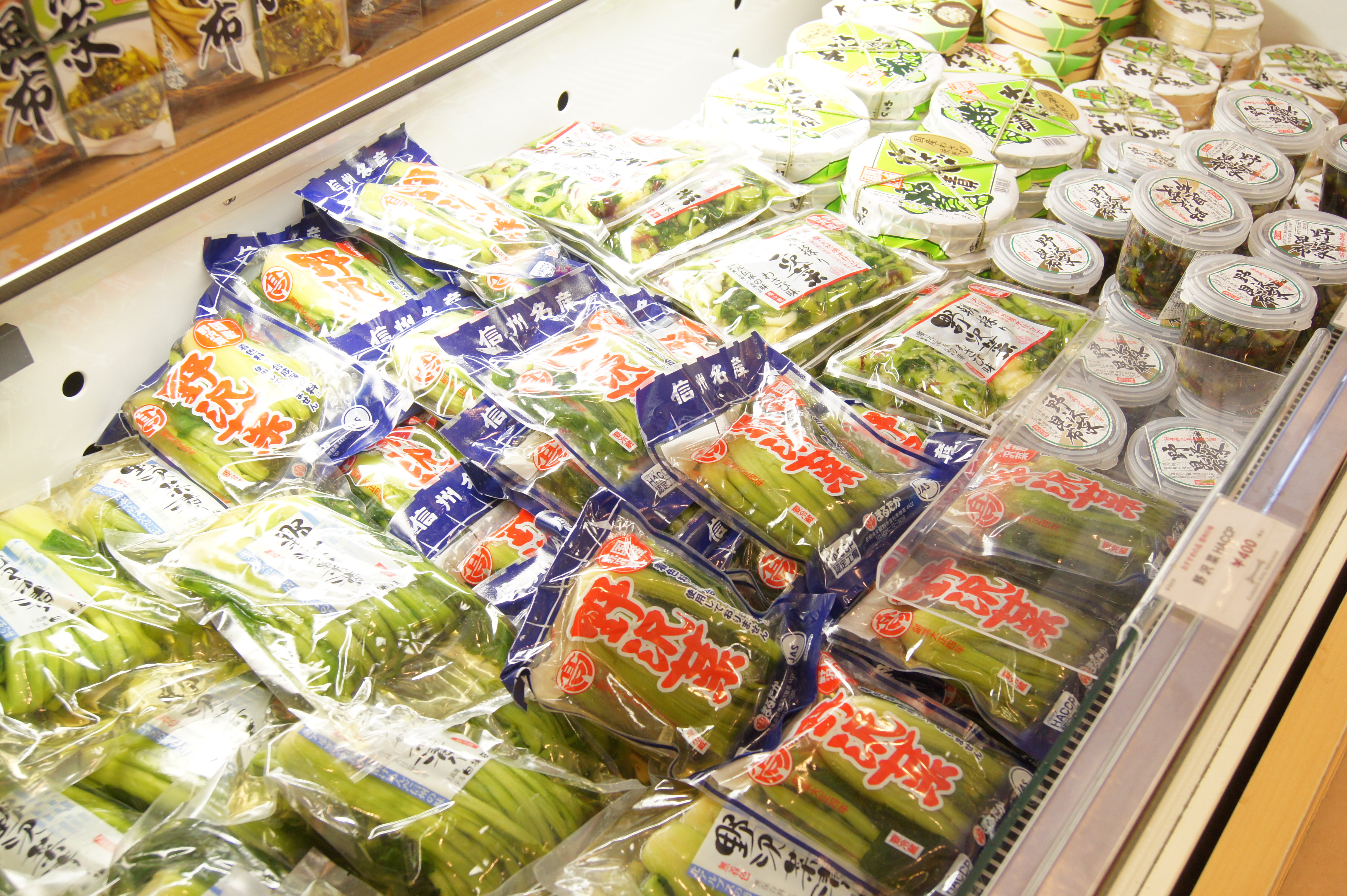 大型売店・・・野沢菜